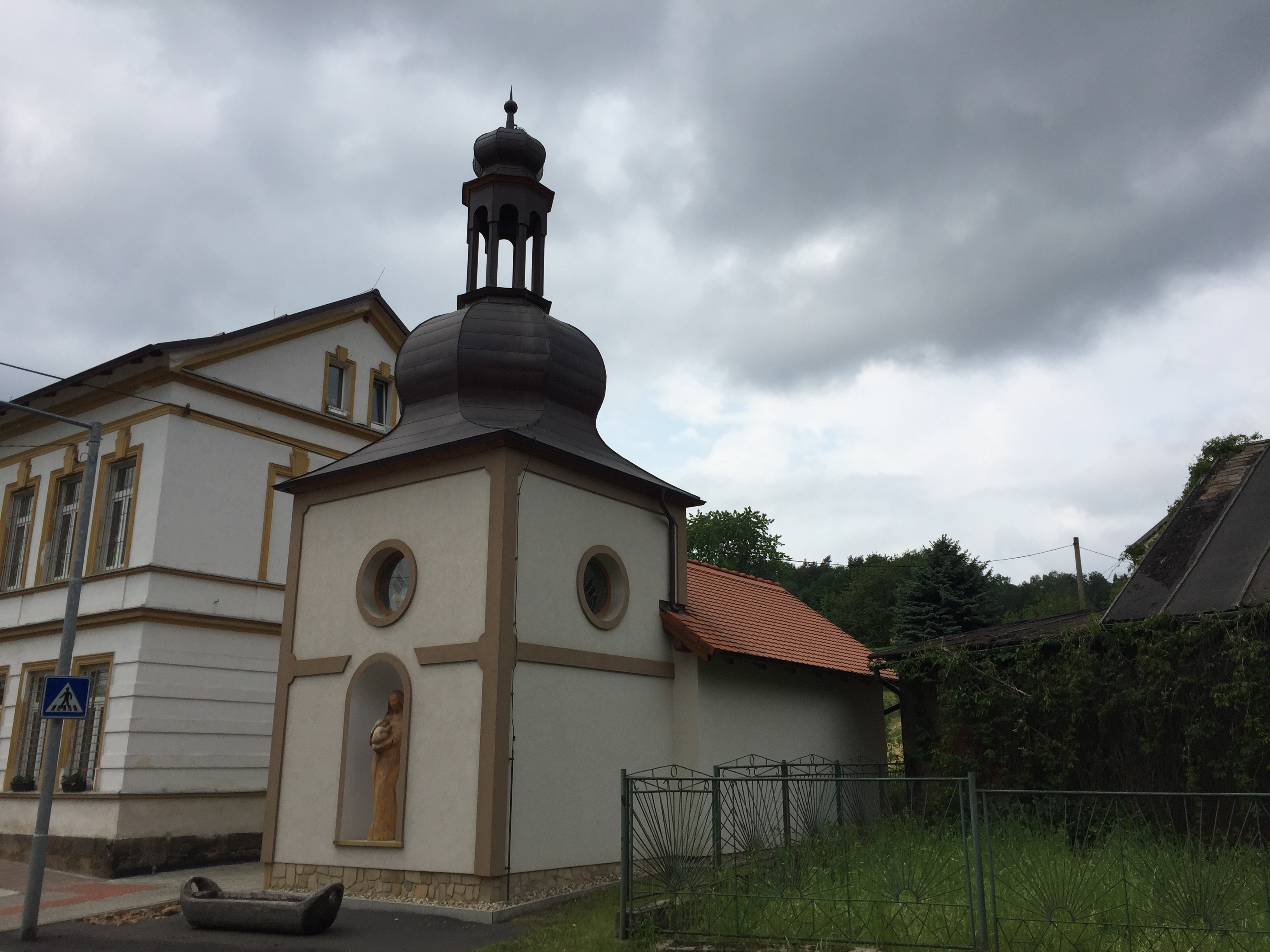 Kaple, Ludvíkovice, průčelí a bok